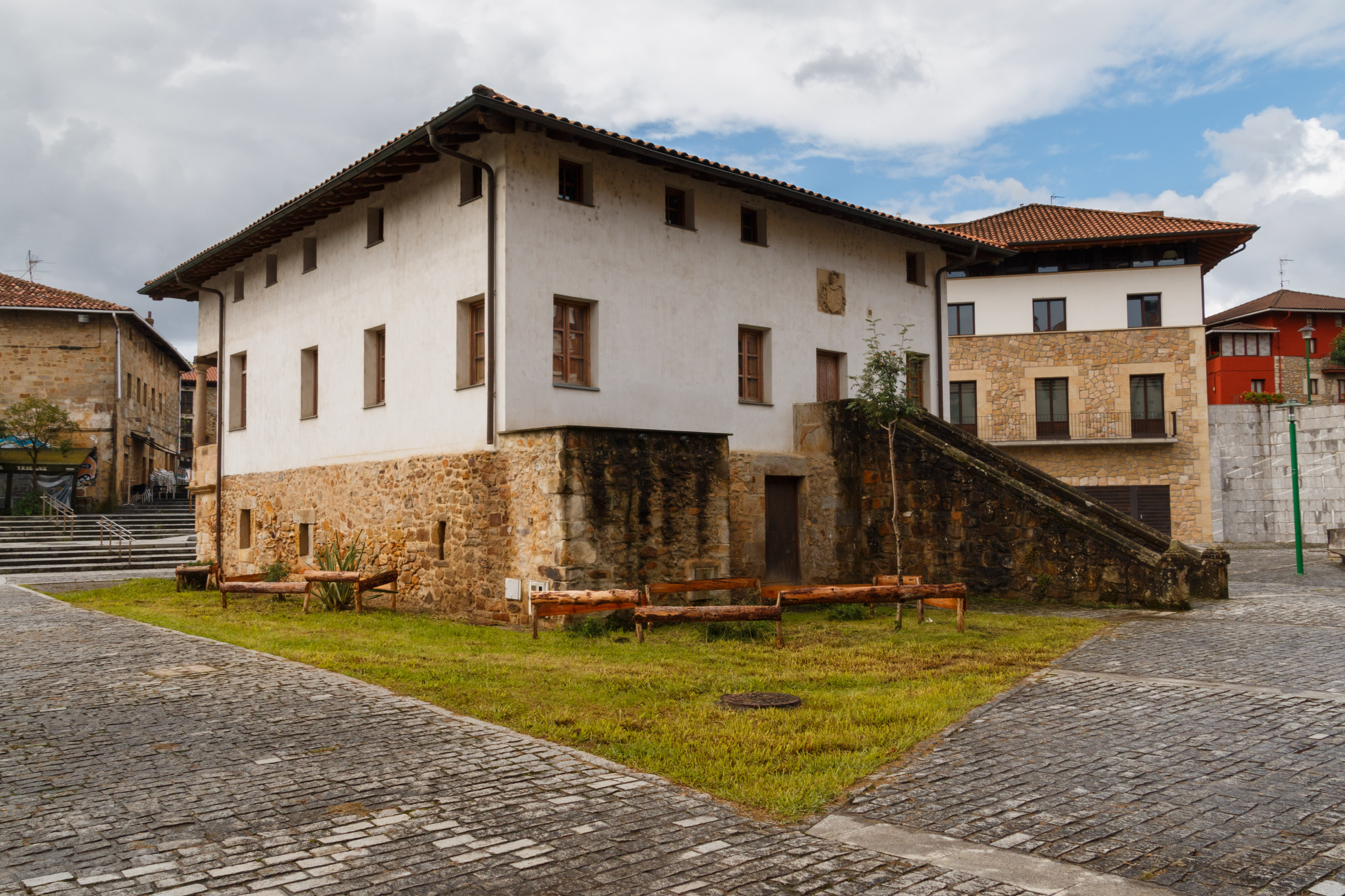 Anguleria jauregia